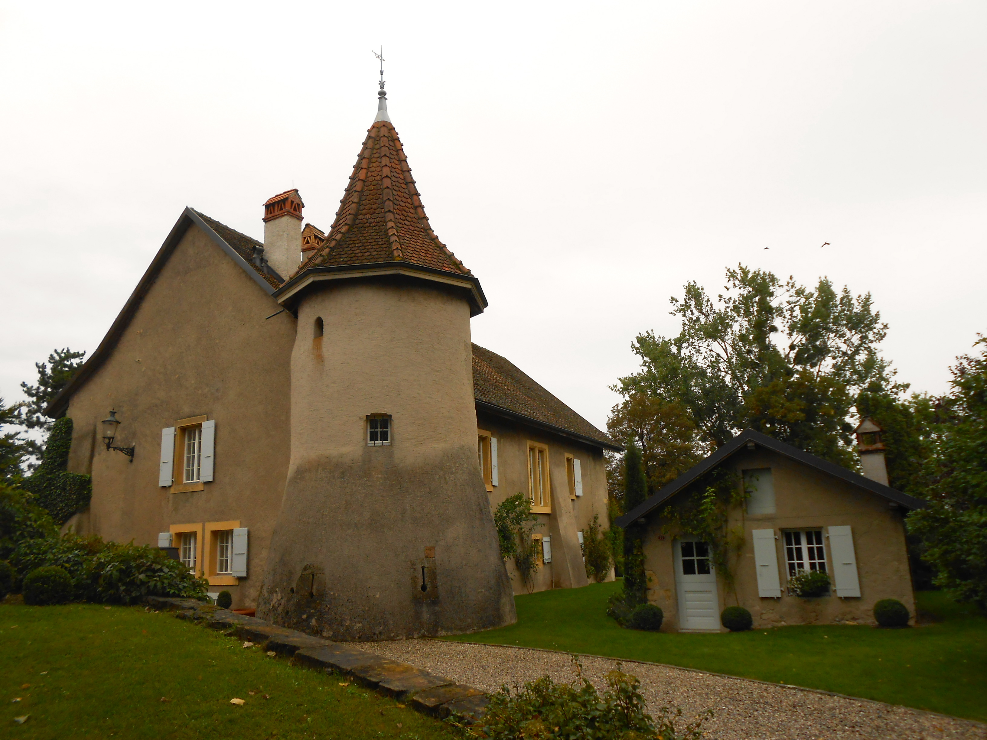 Château de Senarclens